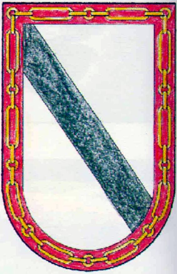 ARMAS DE DOÑA ELVIRA DE ZUÑIGA. MADRE DEL PRIMER MARQUÉS DE LAS NAVAS.